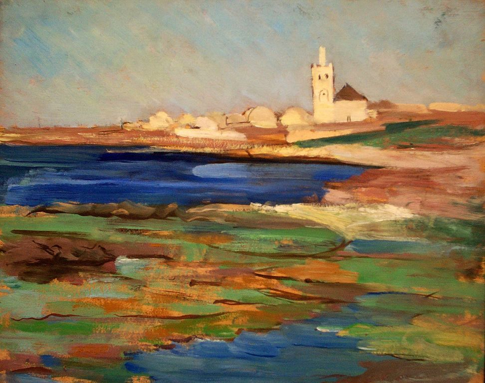 Azzemour